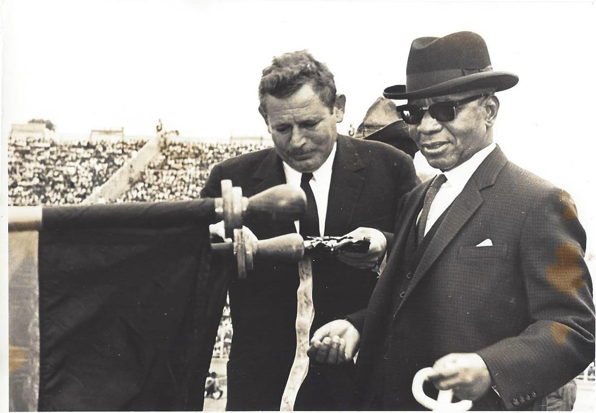 אמנון ענבר עם נשיא מלאווי הייסטינגס באנדה